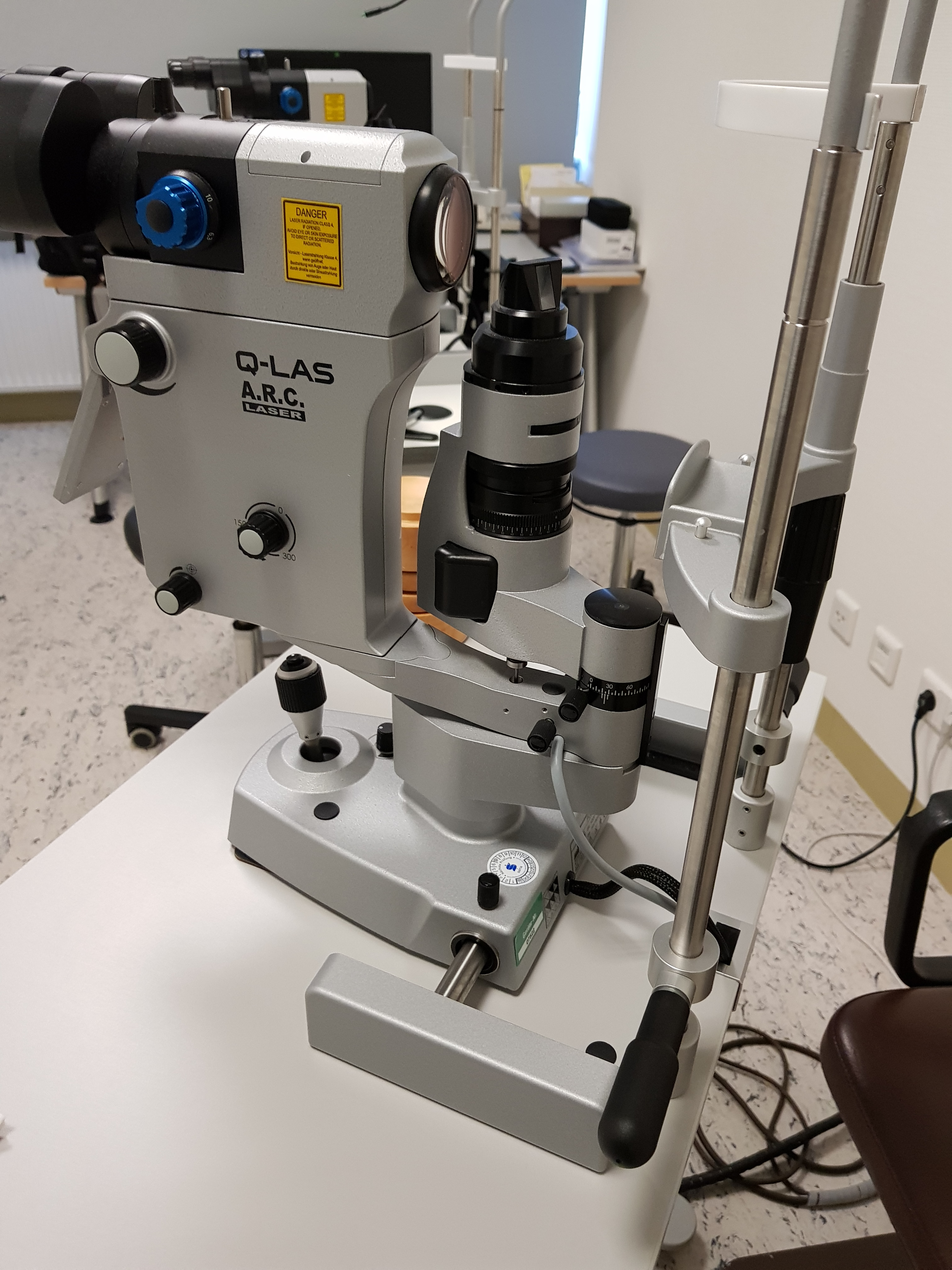 YAG Laser für die Iridotomie in einer Augenklinik